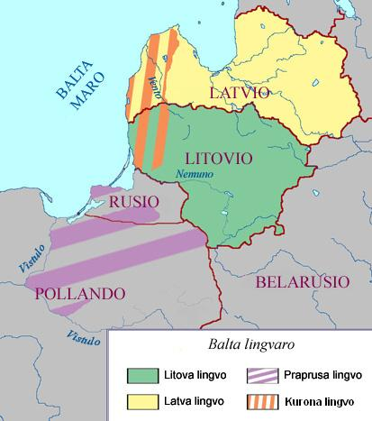 Mapo de la Balta lingvaro en Esperanto